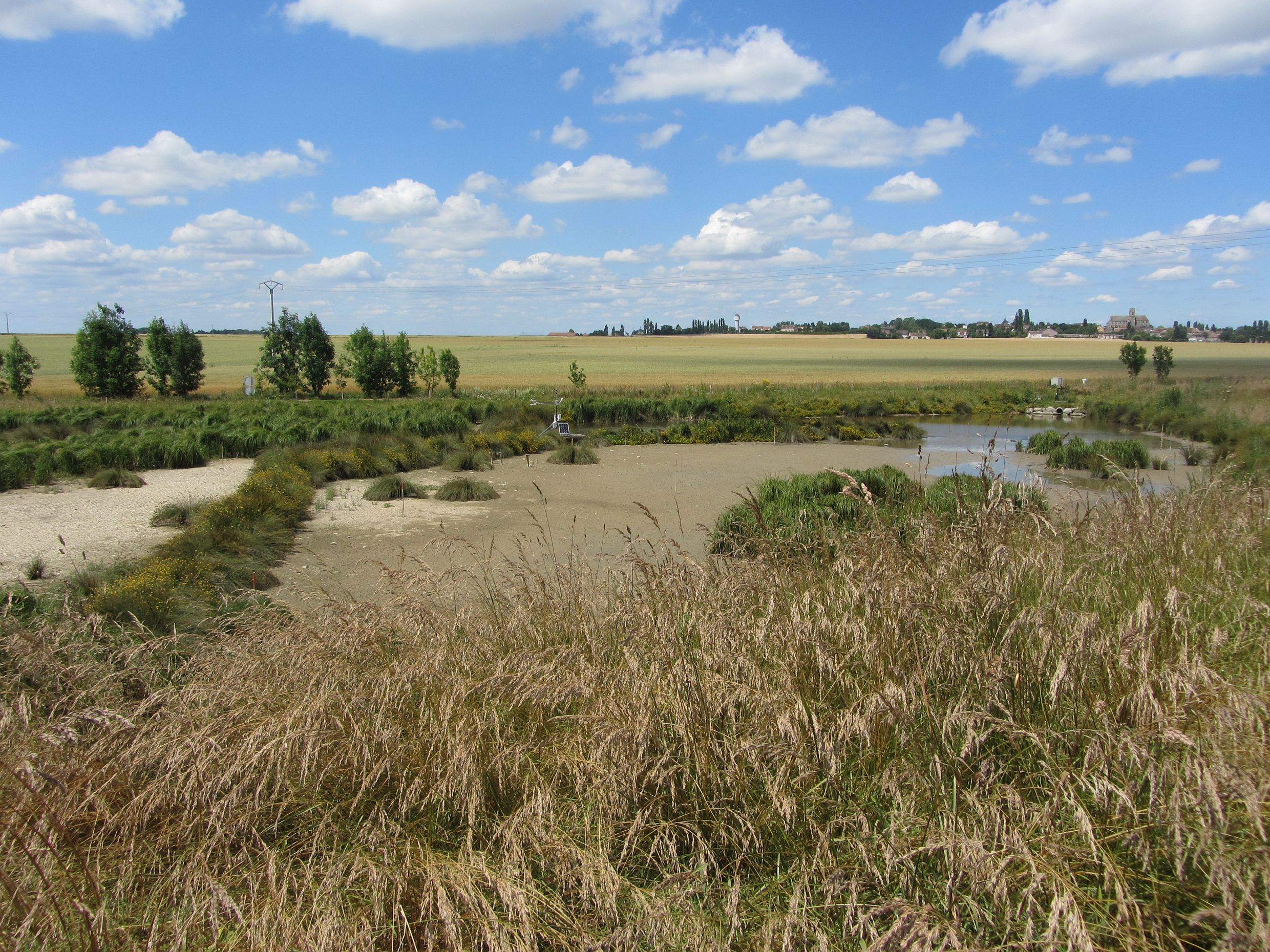 Vue de la zone tampon humide de Rampillon (travaux Irstea)